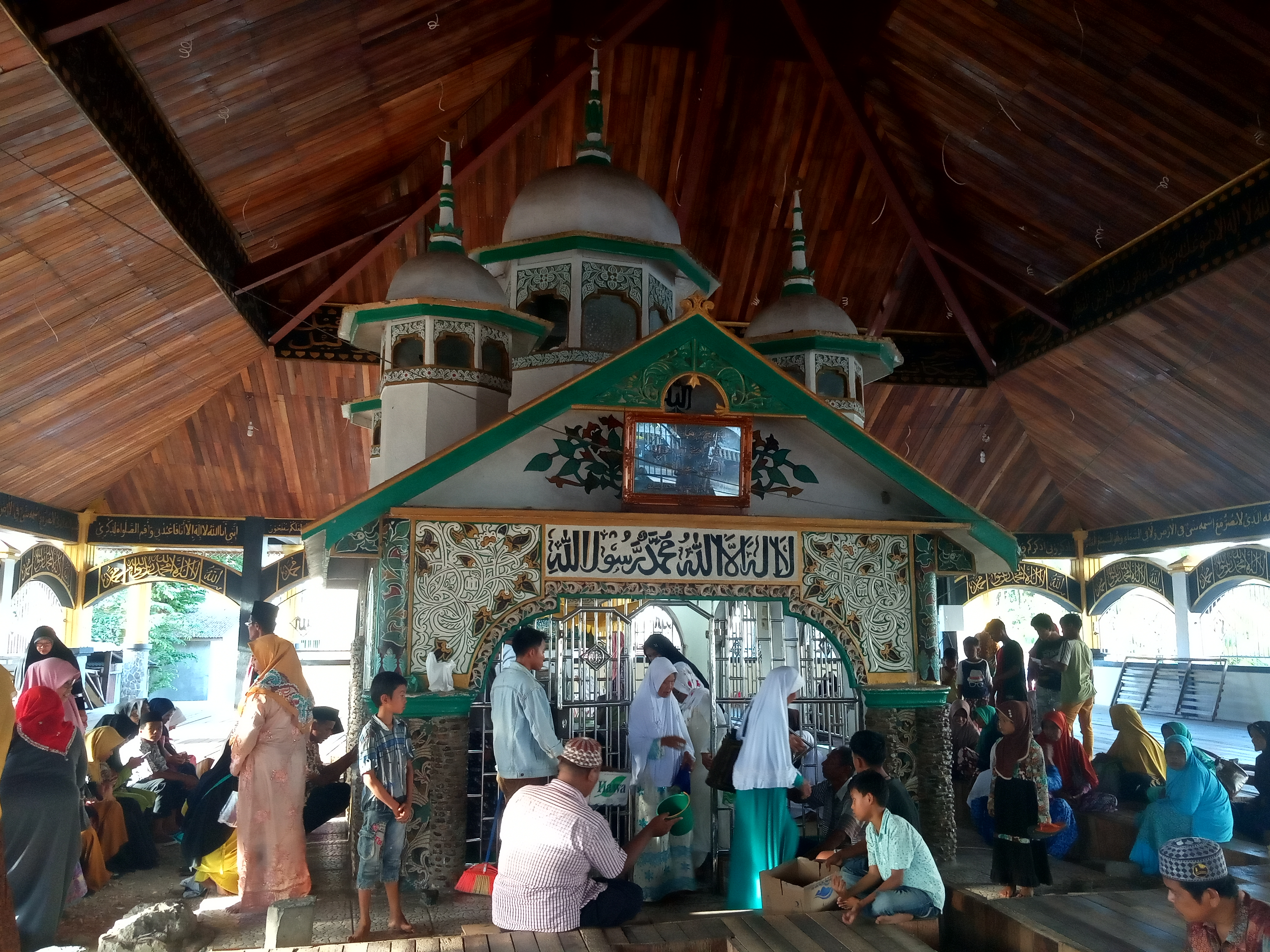 Jemaah tarekat berziarah ke makam Syekh Burhanuddin